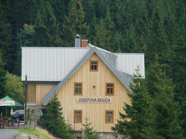 Josefova bouda (1150 m.n.m.)